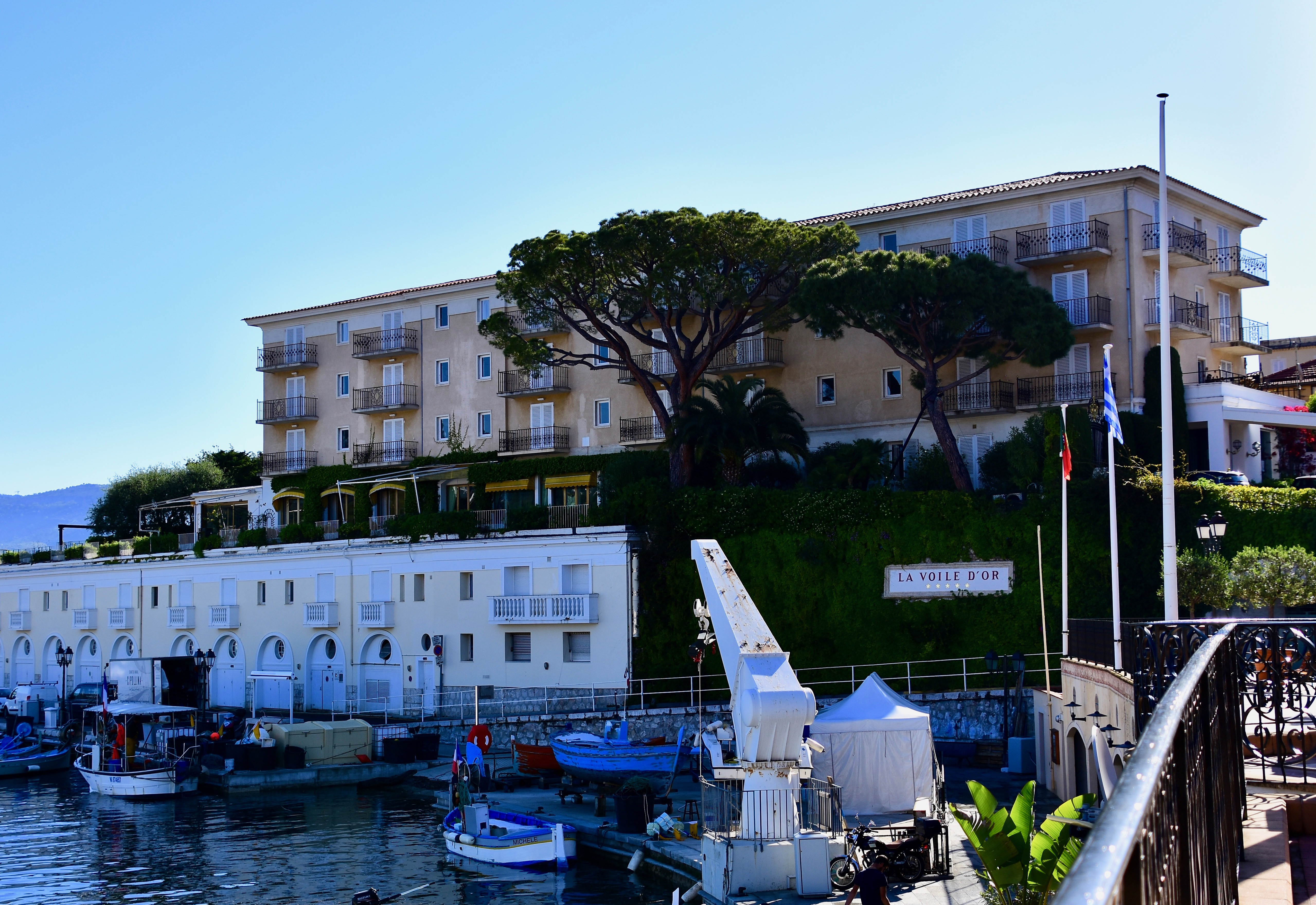 Hôtel La voile d'Or Saint-Jean-Cap-Ferrat vue depuis le port